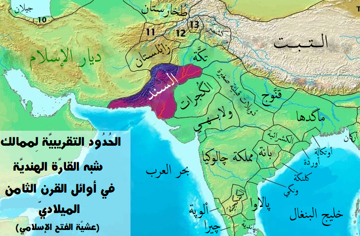 ممالك شبه القارَّة الهنديَّة في أوائل القرن الثامن الميلاديّ.